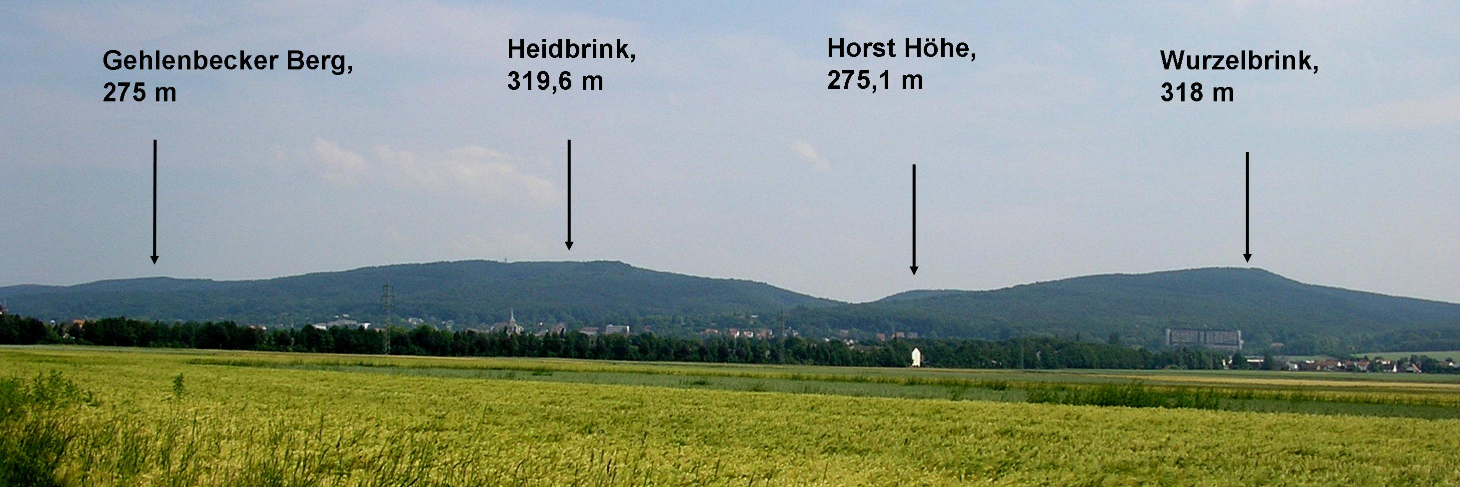 Ansicht von Lübbecke in Nordrhein-Westfalen am Nordhang des Wiehengebirges. Von links nach rechts (Ost nach West) sind folgende Berge markiert: Gehlenbecker Berg Heidbrink (Der Heidbrink ist der höchste Berg des Wiehengebirges) Horst Höhe Wurzelbrink